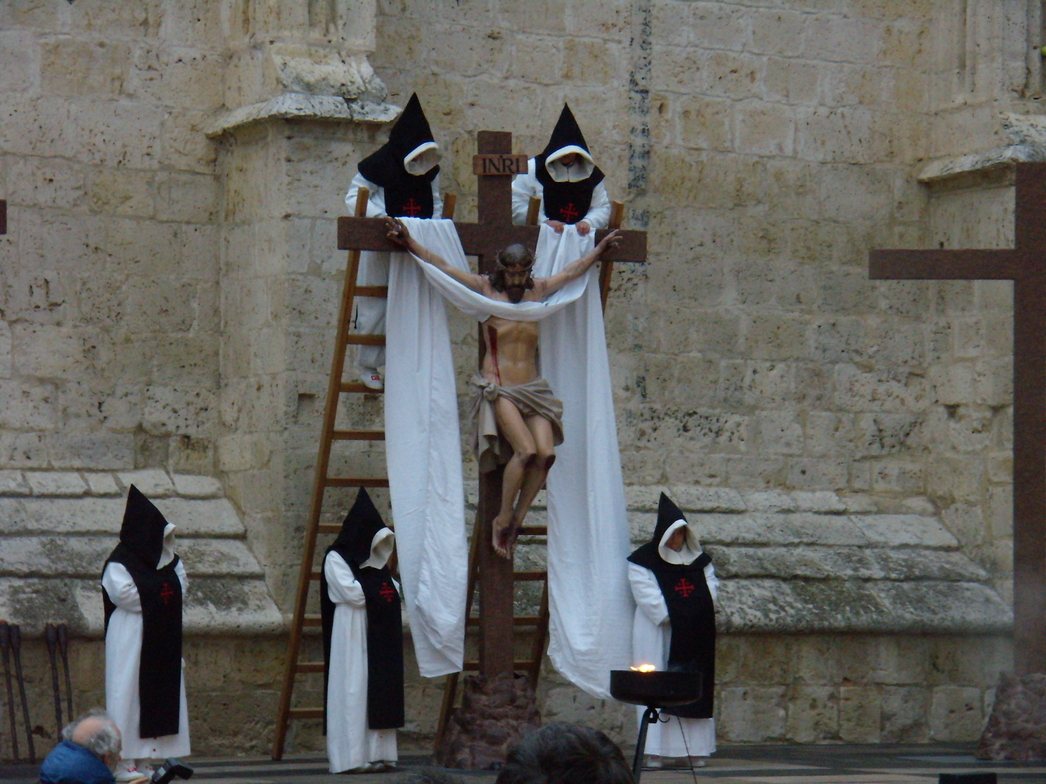 Función del Descendimiento en la Semana Santa de Palencia. Viernes Santo de 2007.